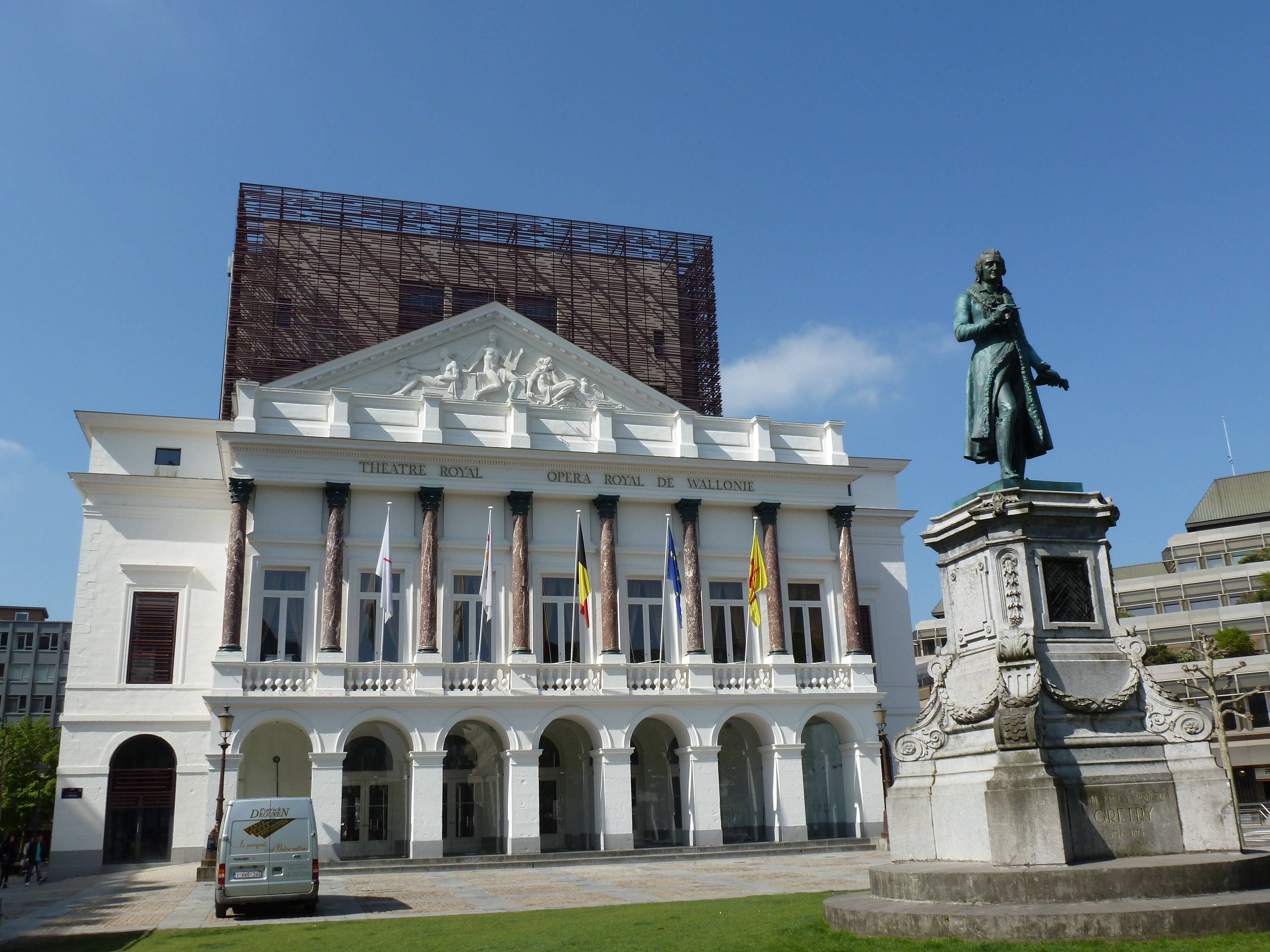 récemment rénové